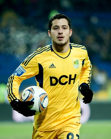 Во время матча ФК Металлист - ФК ОБолонь